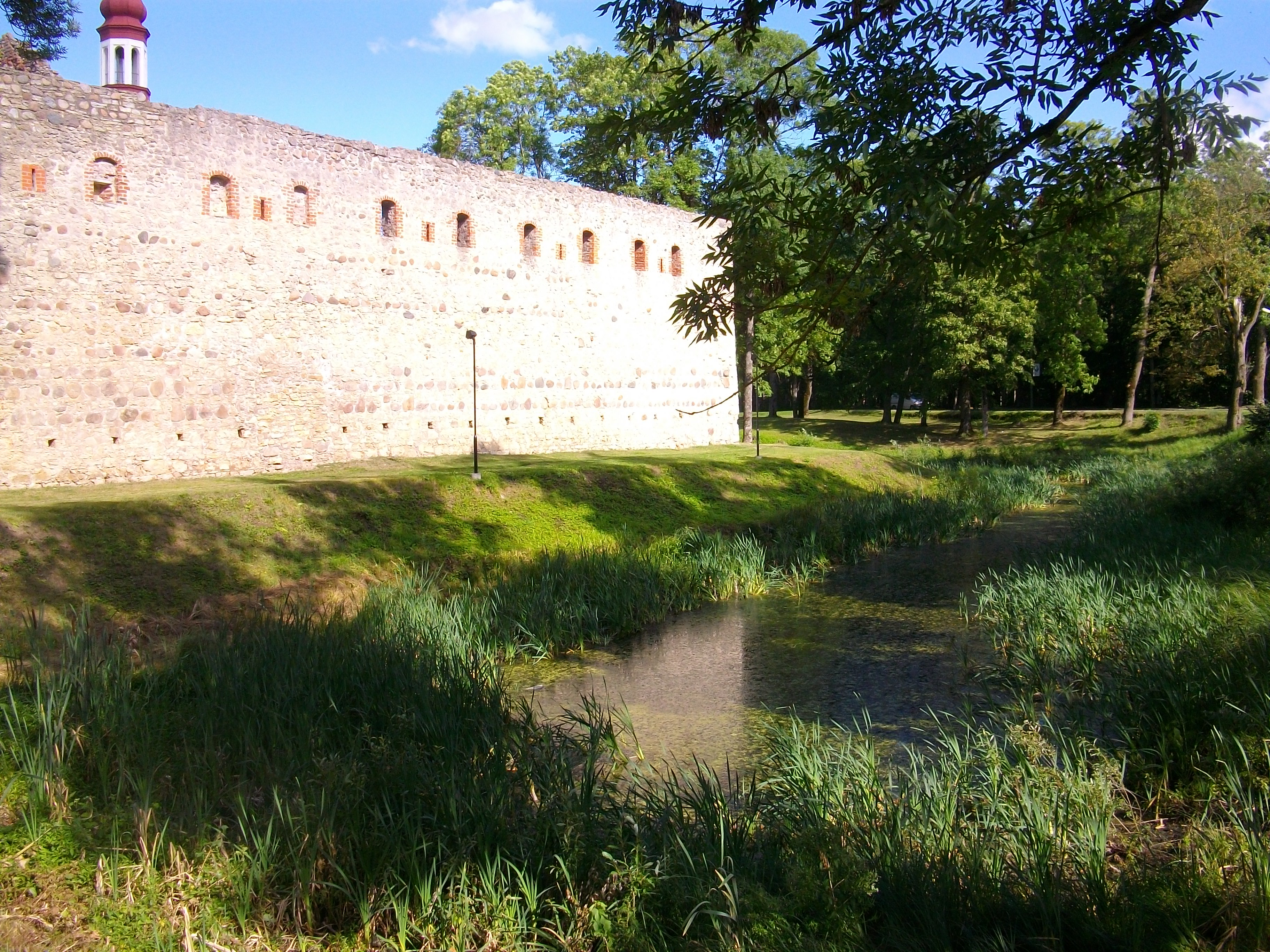 Põltsamaa linnuse varemed vallikraaviga